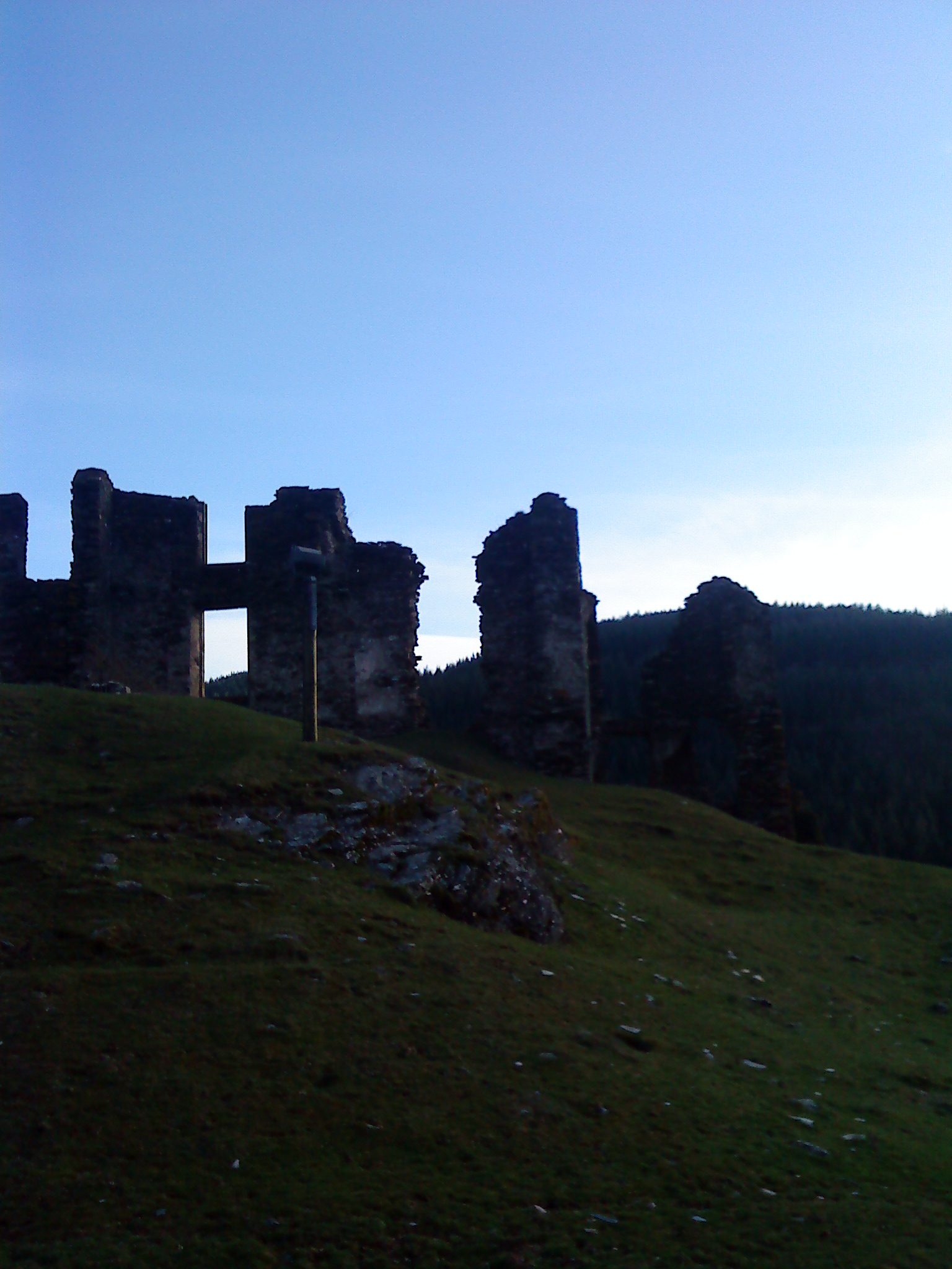 Ruines du château de Saint-Julien-d'Arpaon (Lozère, France)